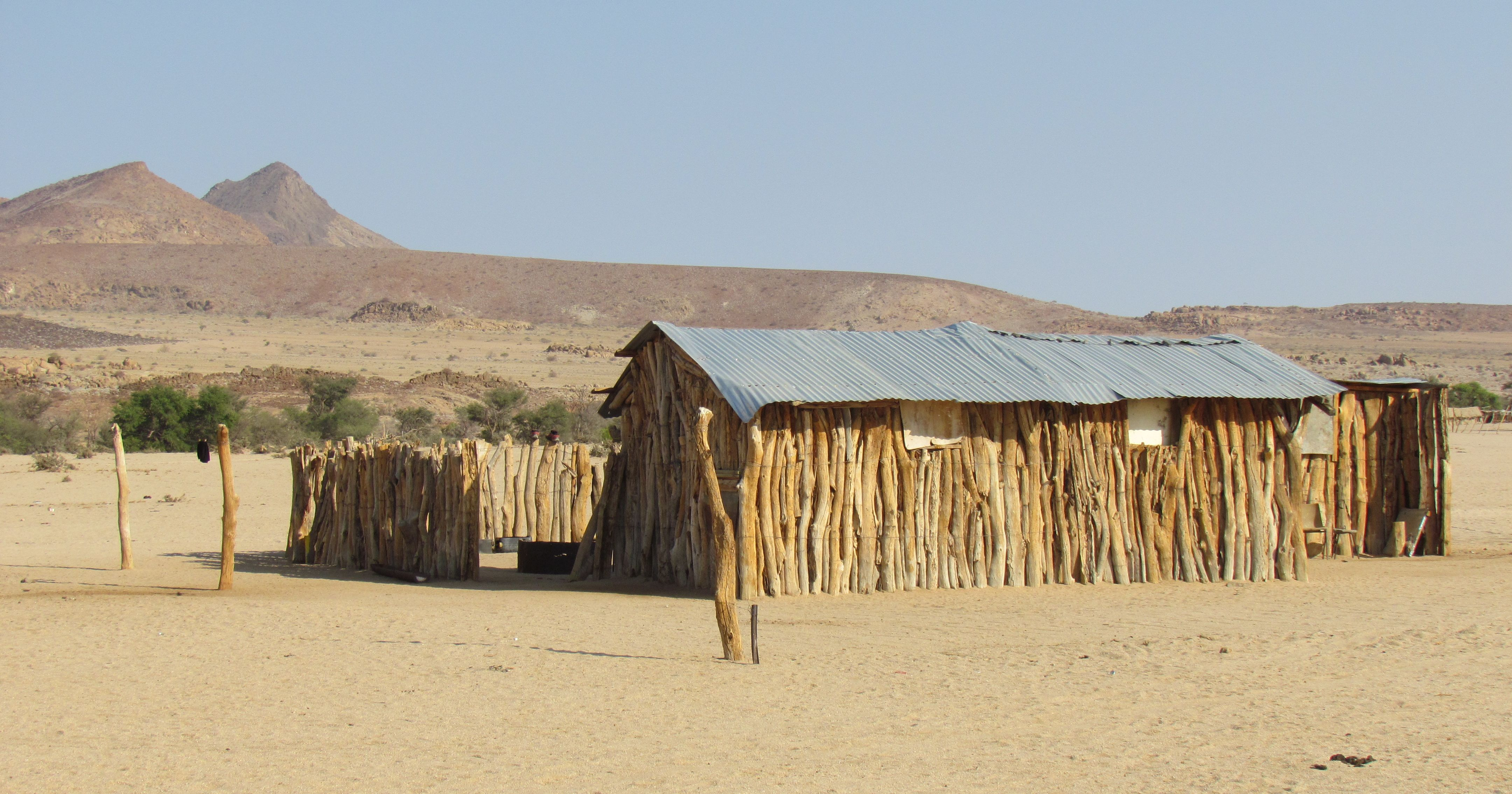 Traditionelle Hütte einer Damara-Familie am Brandbergbergmassiv